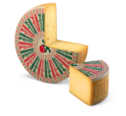 Appenzeller BIO, Käse aus der Ostschweiz